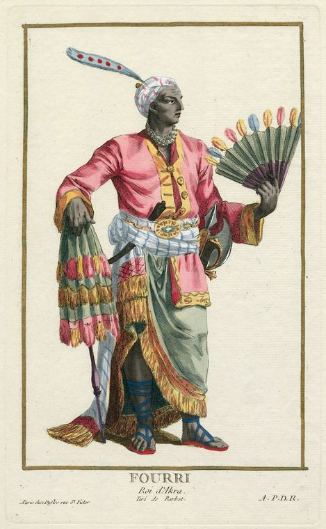 Fourri; Roi d'Akra